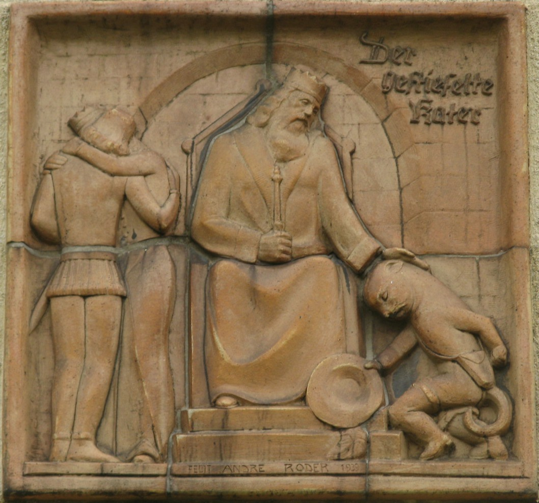 Der gestiefelte Kater (1939), Terrakottarelief von Andre Roder, Johann-Mithlinger-Siedlung, Raxstraße 7-27, Wien-Favoriten